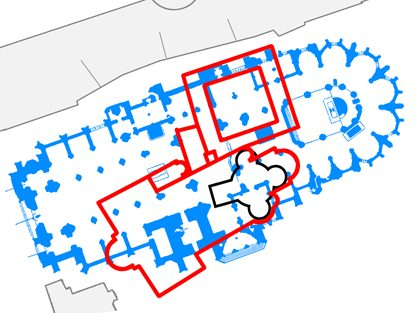 Románská rotunda svatého Víta